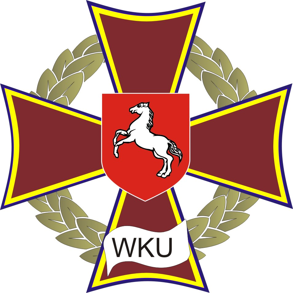 Odznaka Wojskowej Komendy Uzupełnień w Koninie